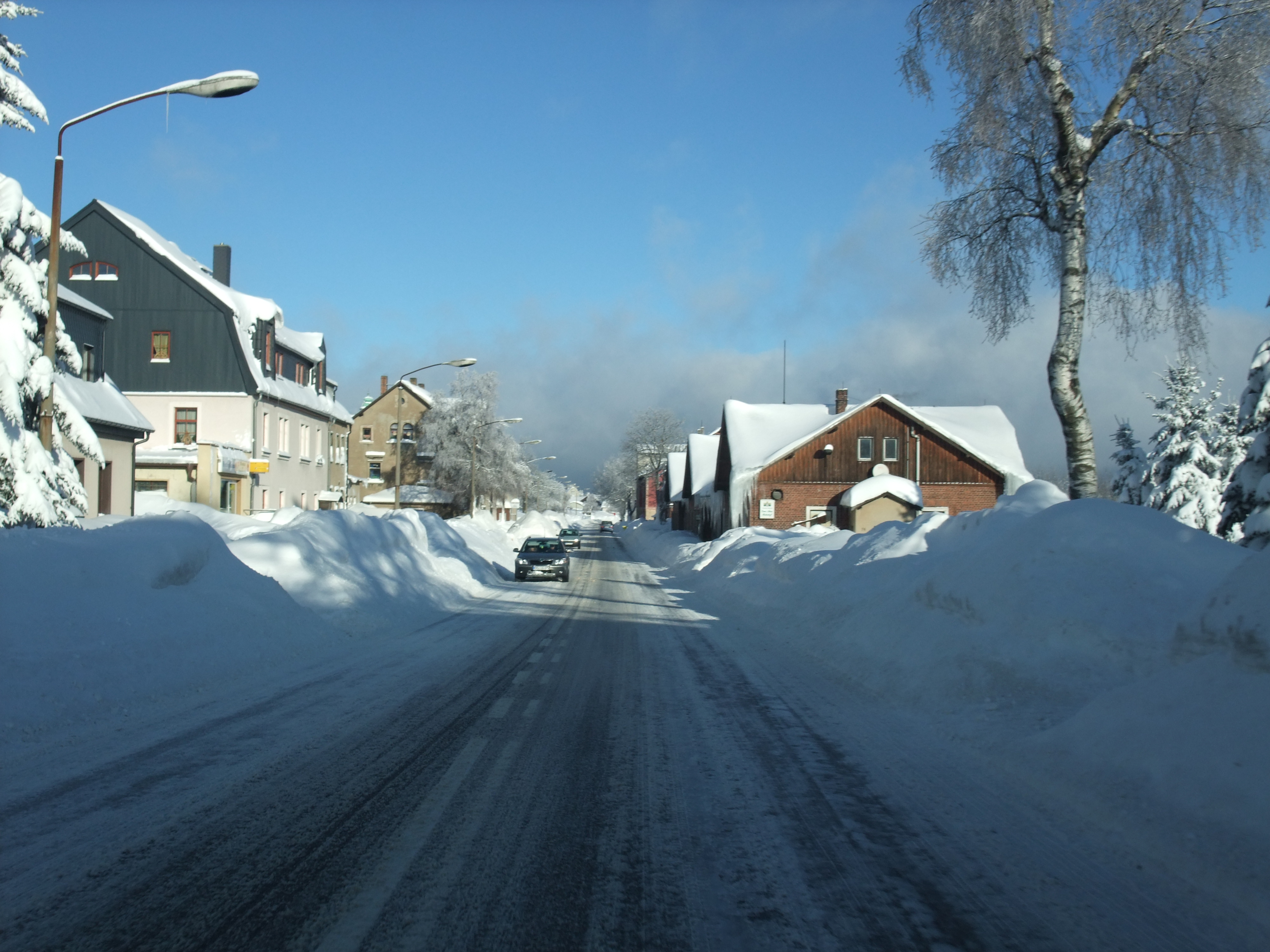 Die Ernst-Thälmann-Straße (B 174) in Reitzenhain, Blickrichtung Norden. Rechts das Empfangsgebäude des Bahnhofes.